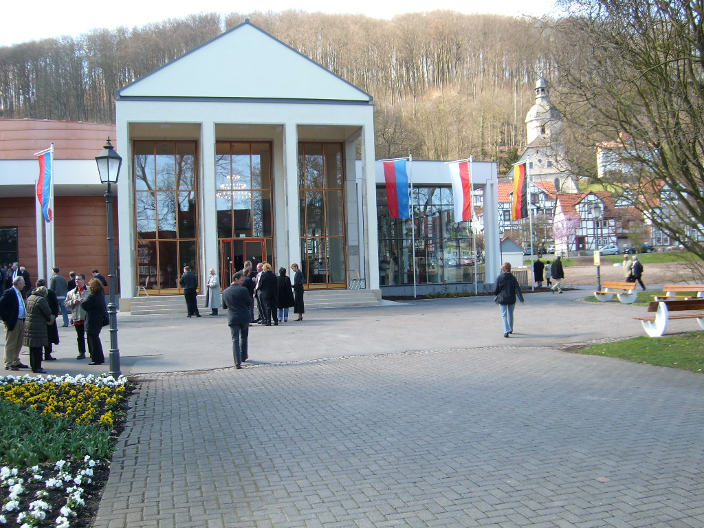 Portal der Kurhalle in Bad Sooden-Allendorf